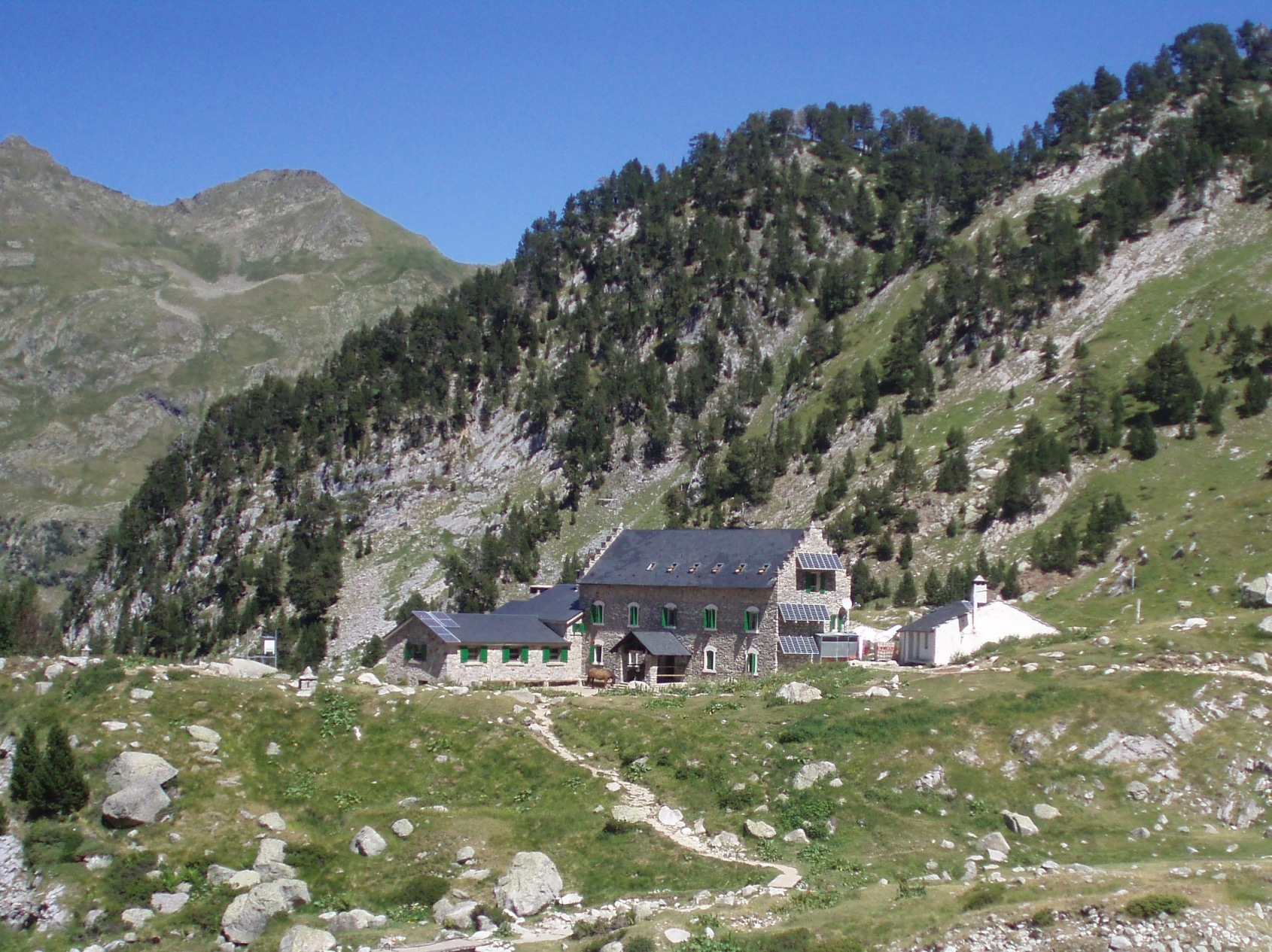 Refugio de montaña de la Renclusa (Pirineos, España).